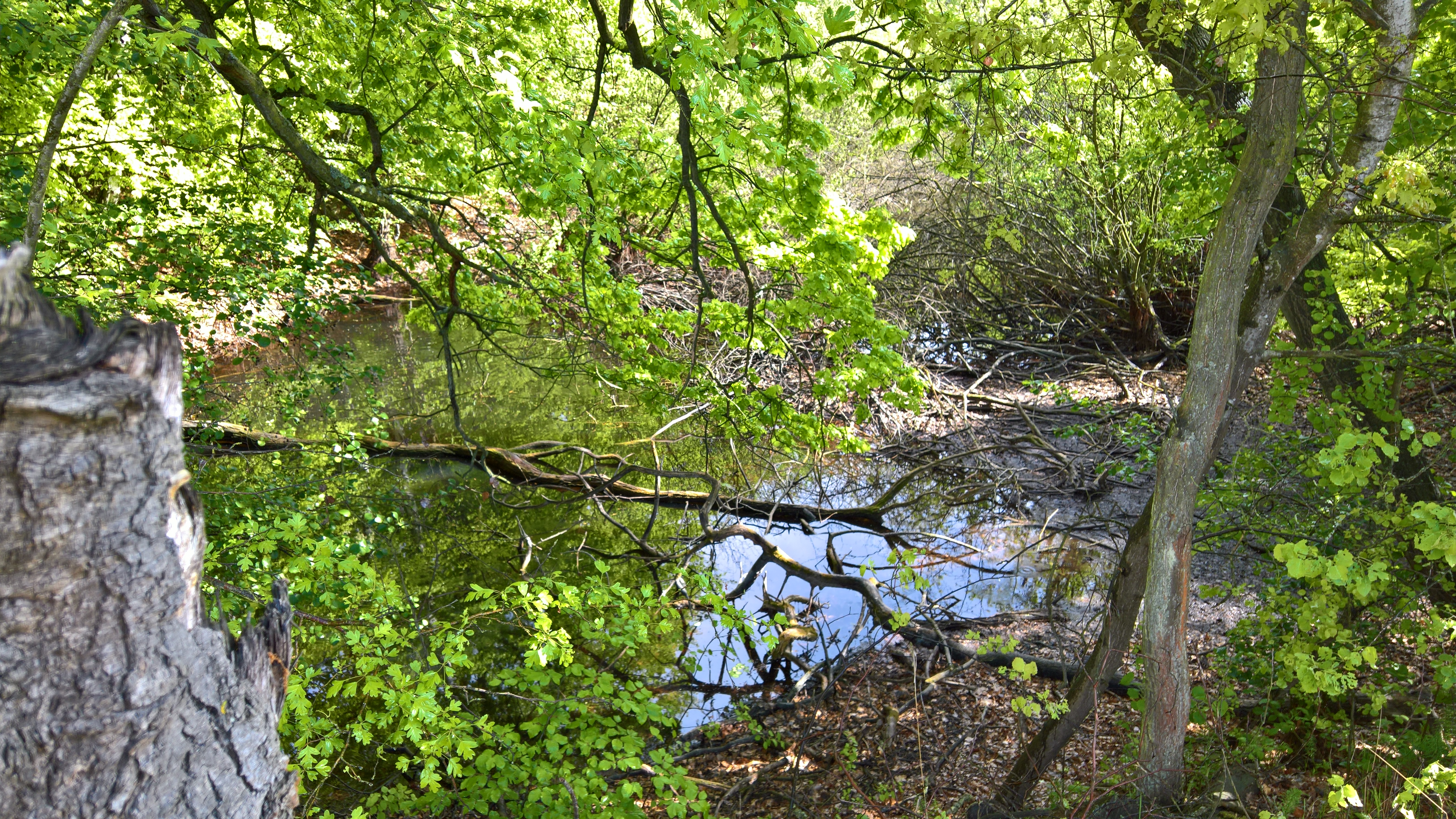 Das Naturdenkmal "Wasserfläche mit Gehölz und Schilf bei Darmstadt-Arheilgen" Teil Gewann "An der Kieskaute" südöstlich des Rangierbahnhofs Kranichstein